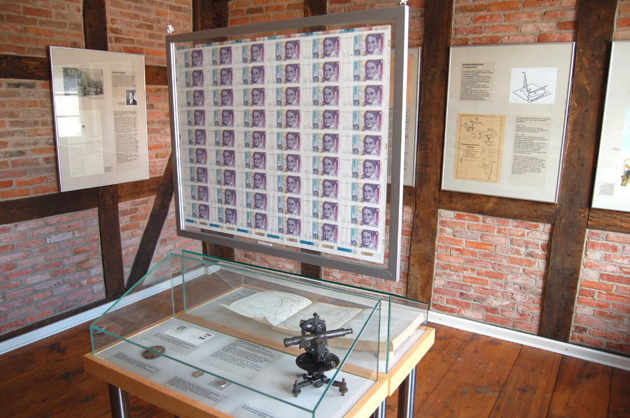 Gaußzimmer in der alten Posthalterei Zeven